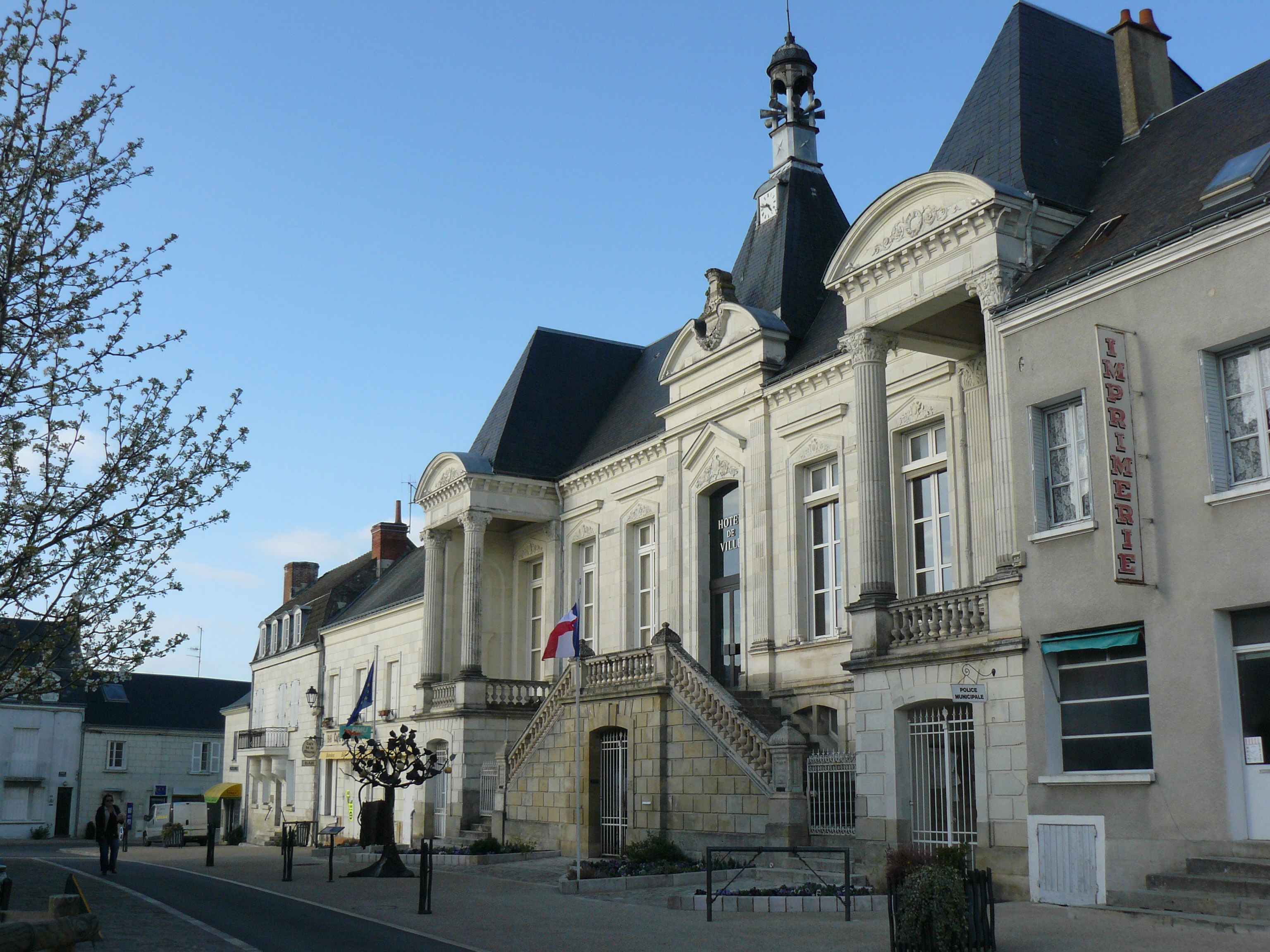 Mairie de Sainte-Maure-de-Touraine